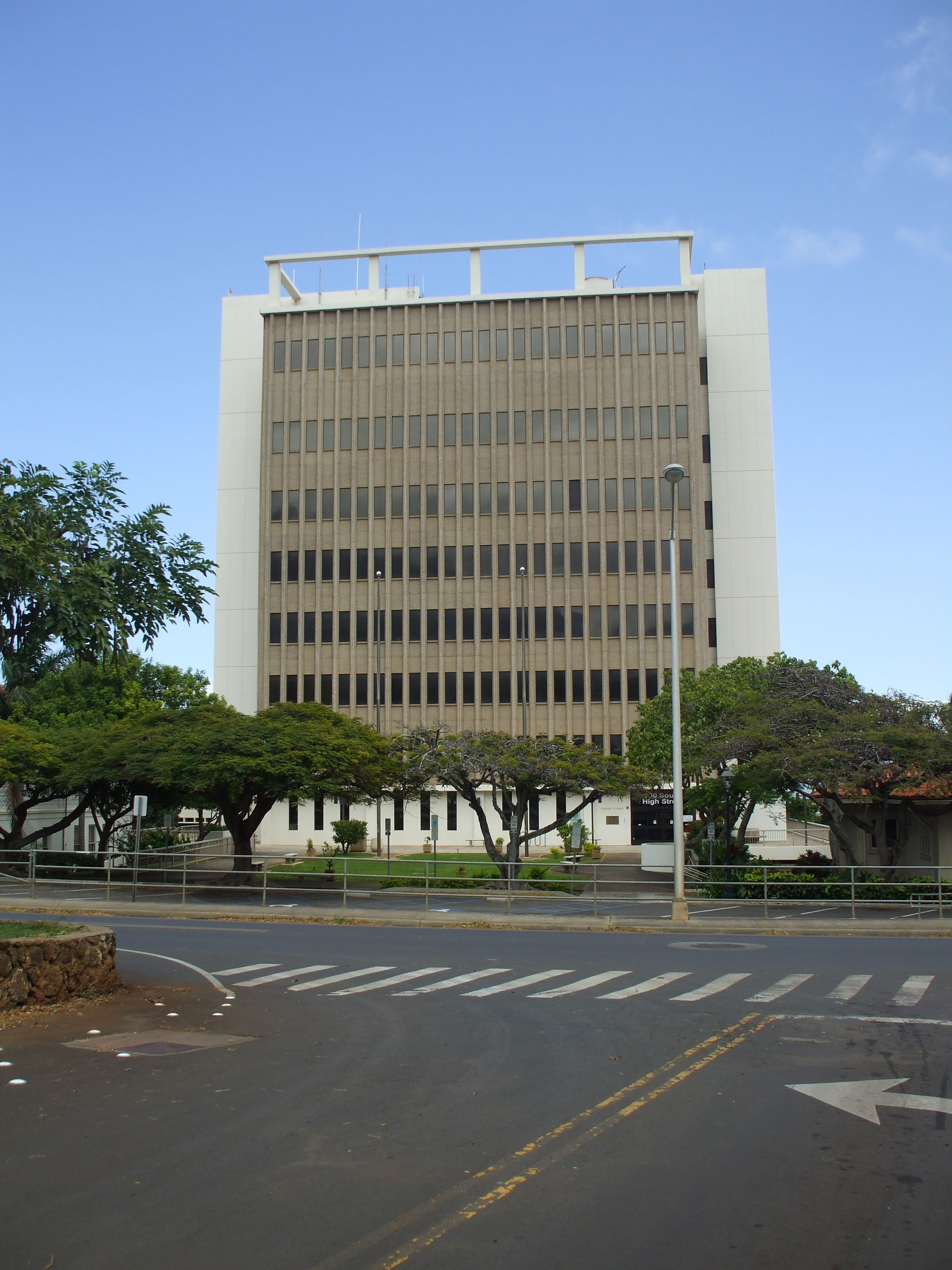 Kalana O Maui County Building.